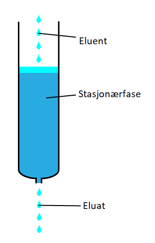 For å forklare begrepet eluant og eluat